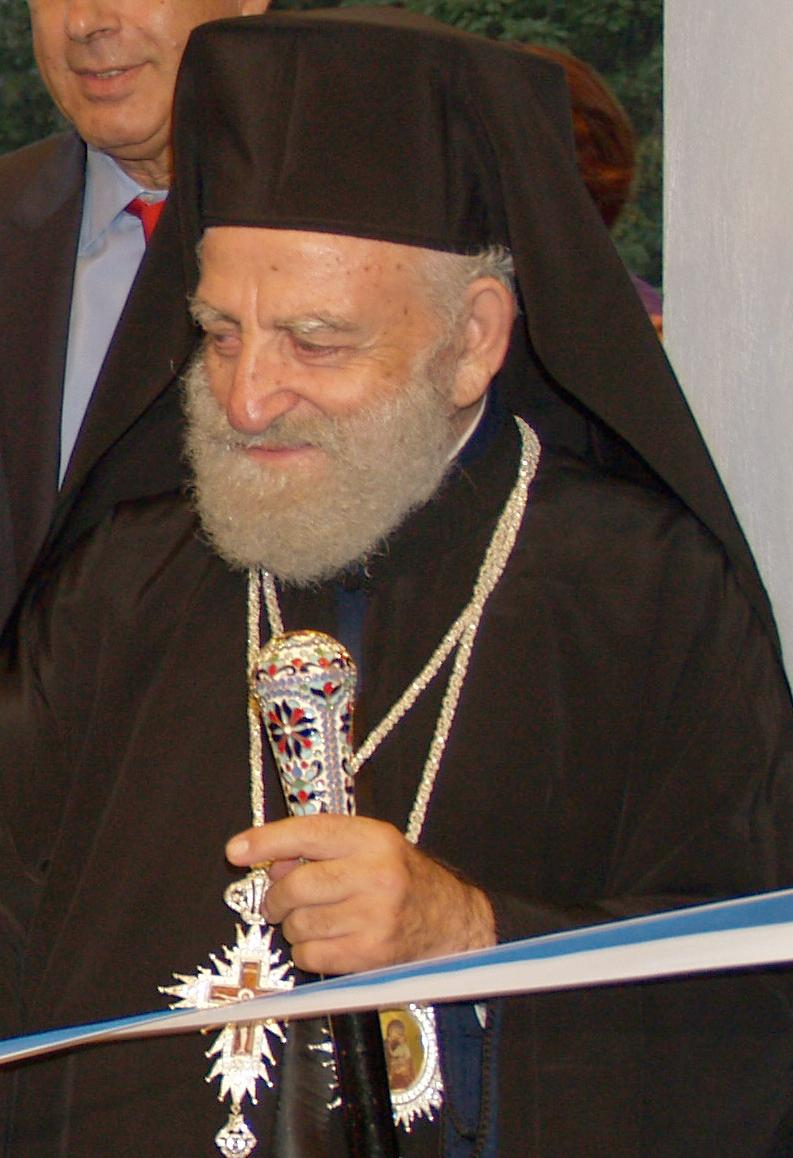 Μητροπολίτης Παροναξίας Καλλίνικος Δεμενόπουλος